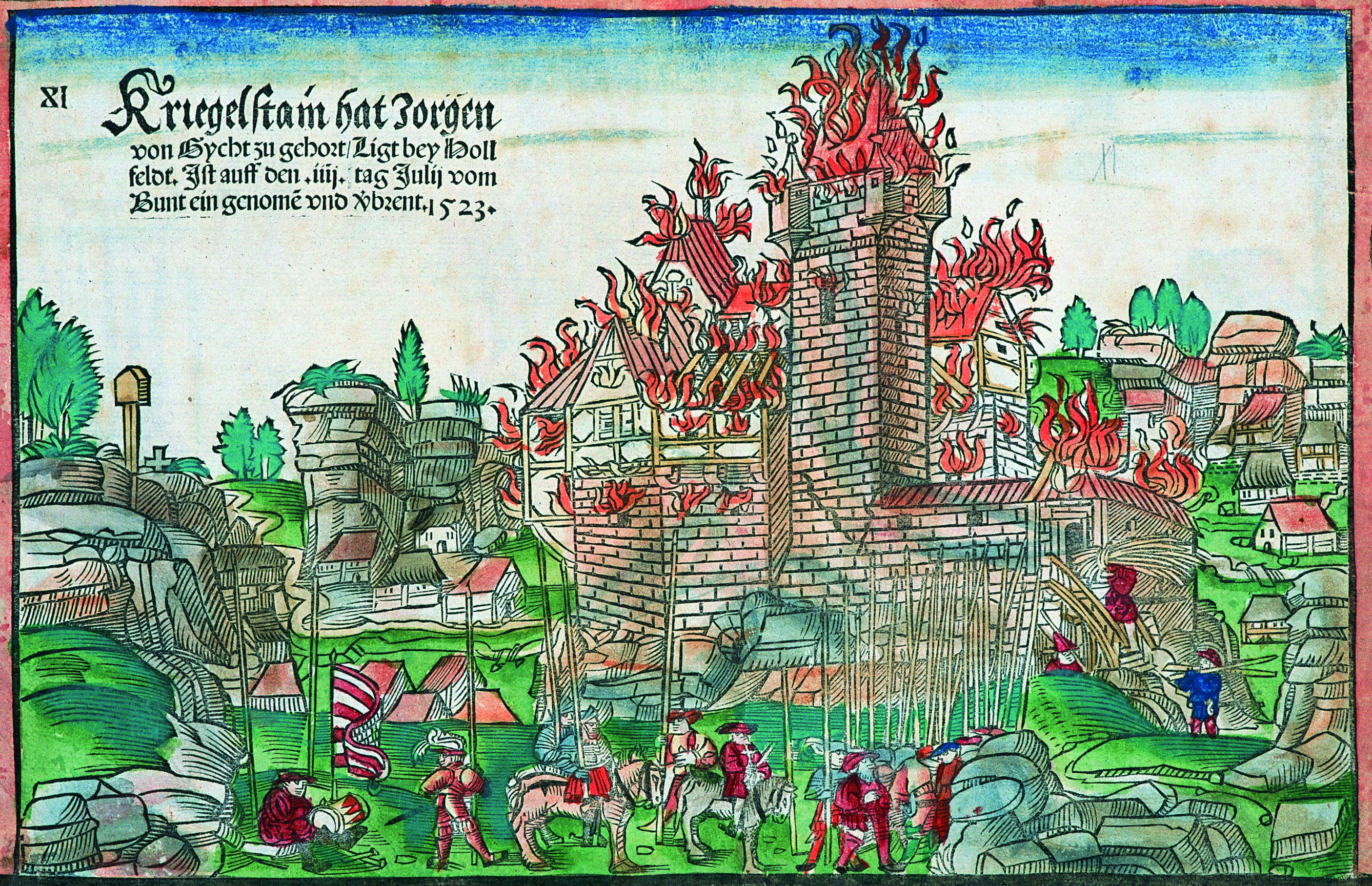 Bild aus dem Burgenbuch der Staatsbibliothek Bamberg, Staatsbibliothek Bamberg, RB.H.bell.f.1